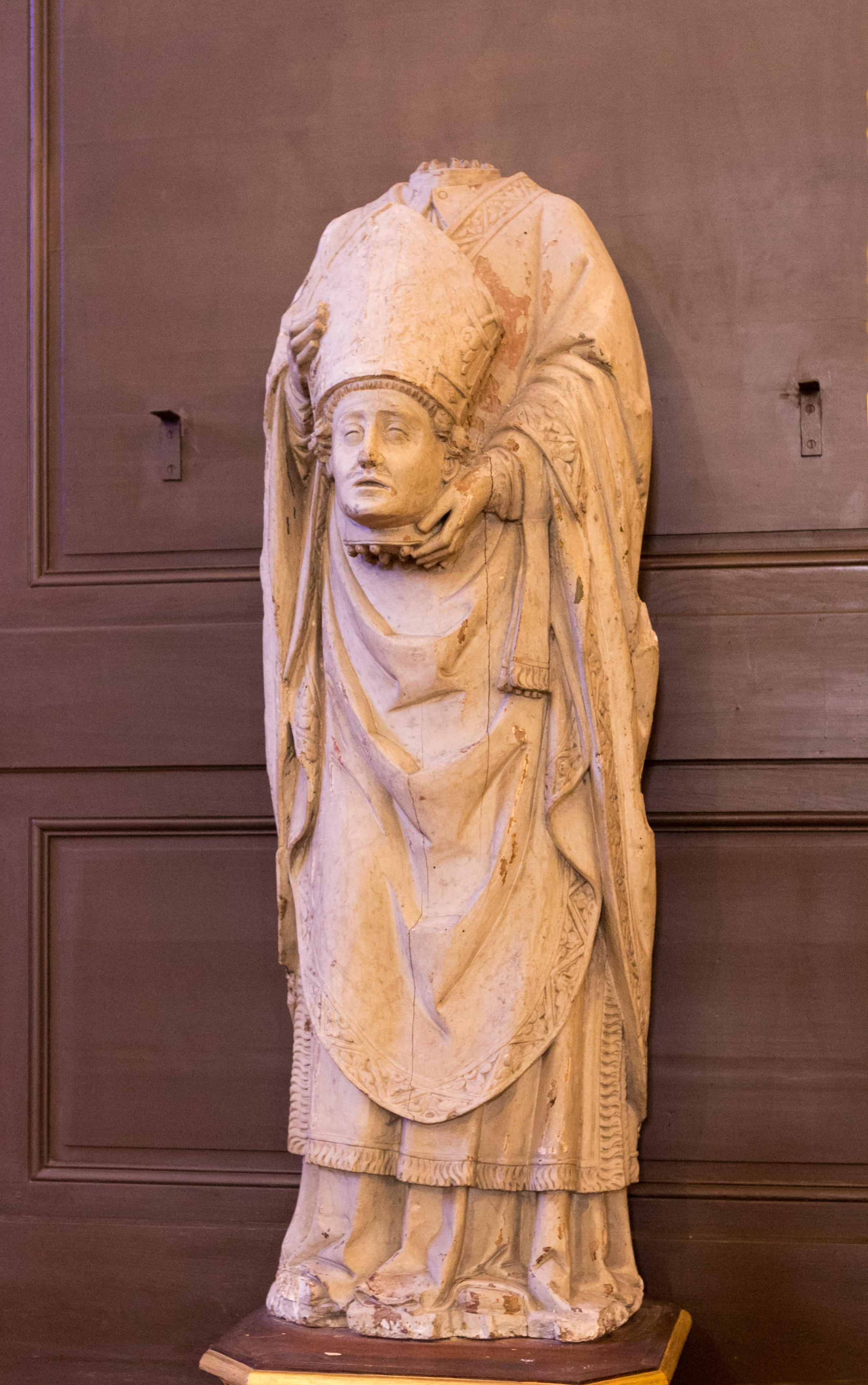 Église Saint-Ayoul de Provins, Provins, département de Seine-et-Marne, France : Saint Ayoul céphalophore (XVIe siècle)